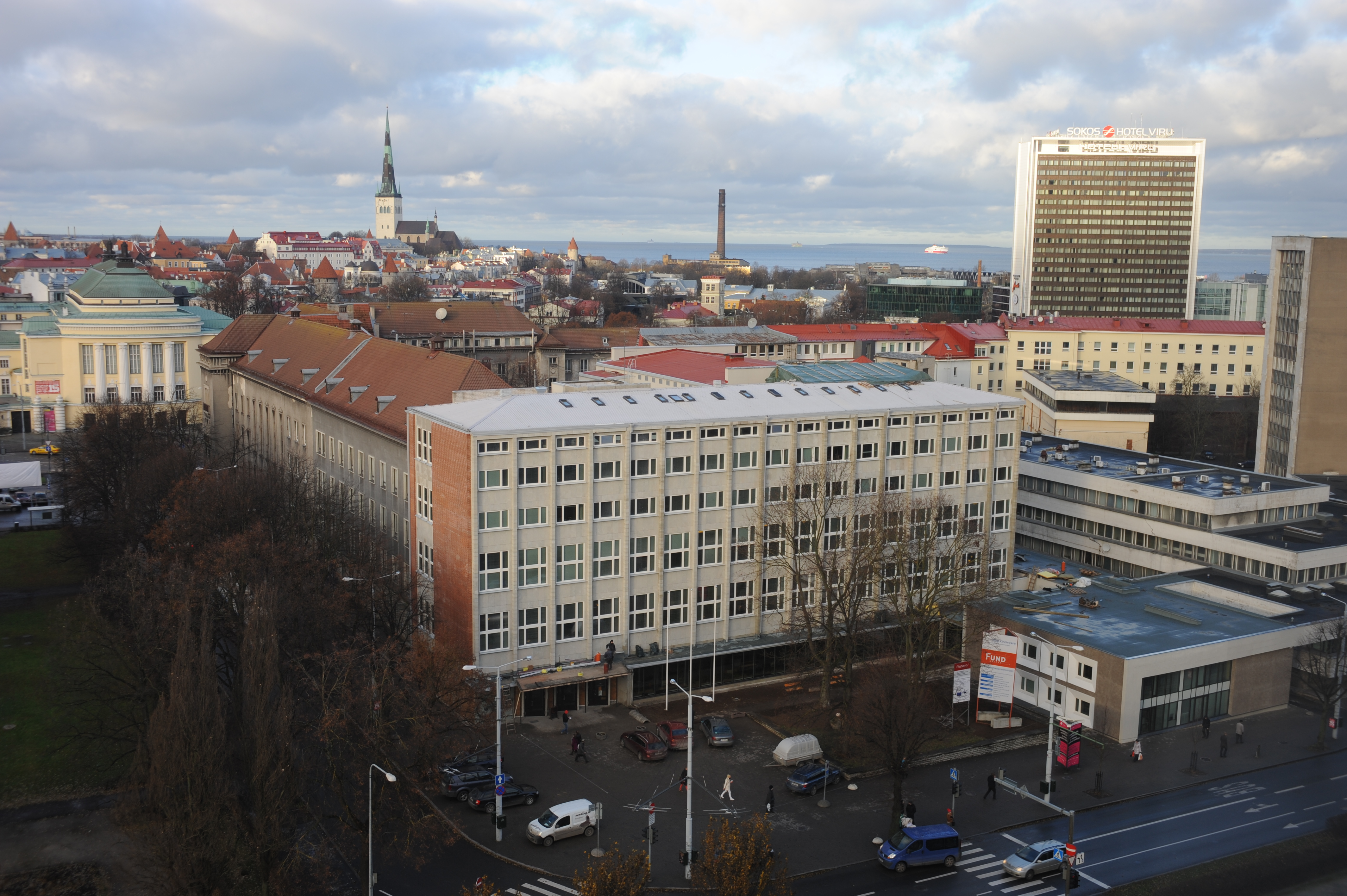 Tallinna Ülikooli Akadeemiline Raamatukogu, teadusraamatukogu hooned Rävala pst 10